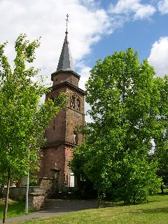 Village de Vauthiermont (Territoire de Belfort). L'église Saint-Antoine. Photo prise en mai 2004 par LP90 Licence GFDL LP90 mai 2004